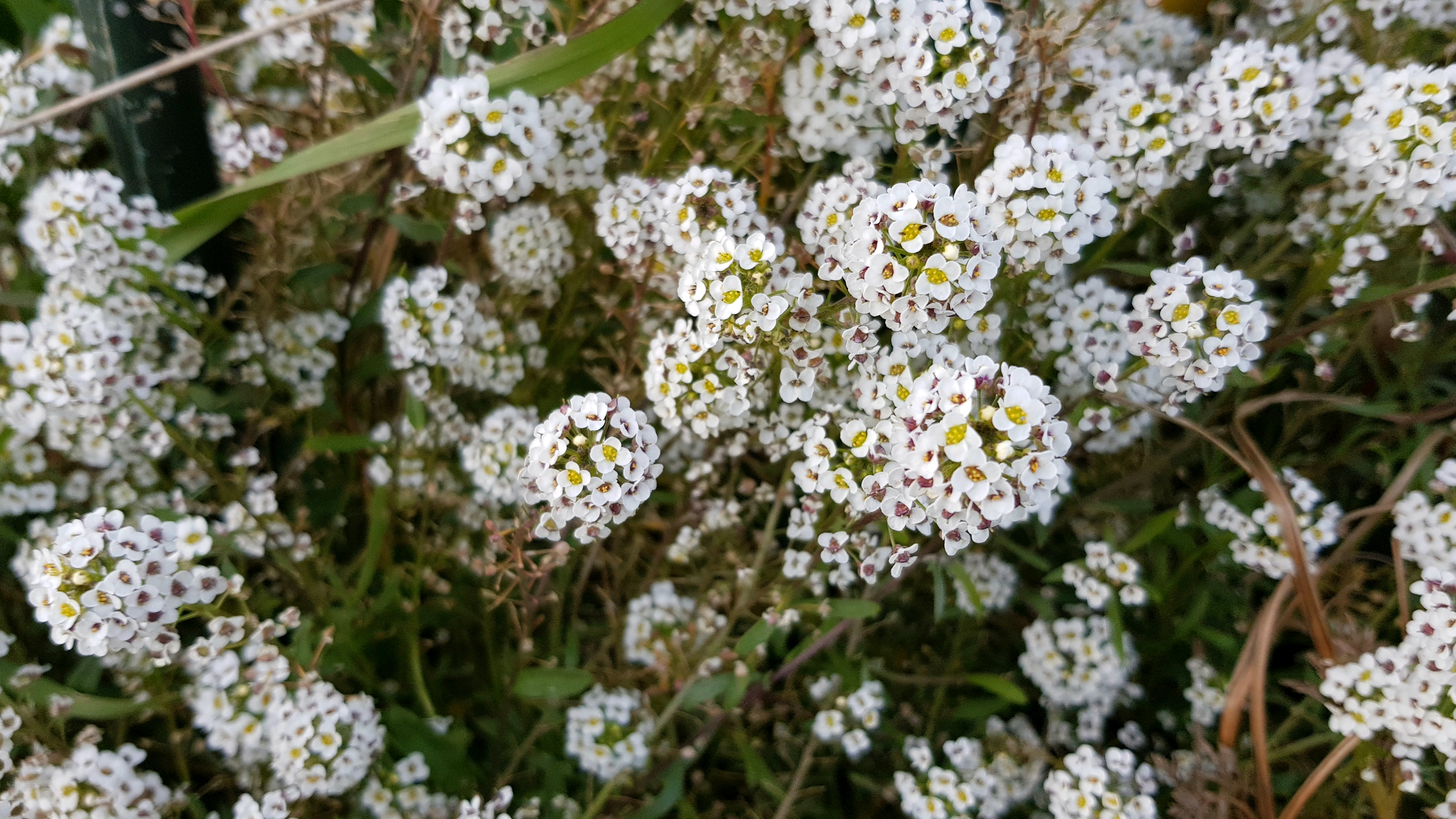 Caps blancs pel Bellveret, Xàtiva.